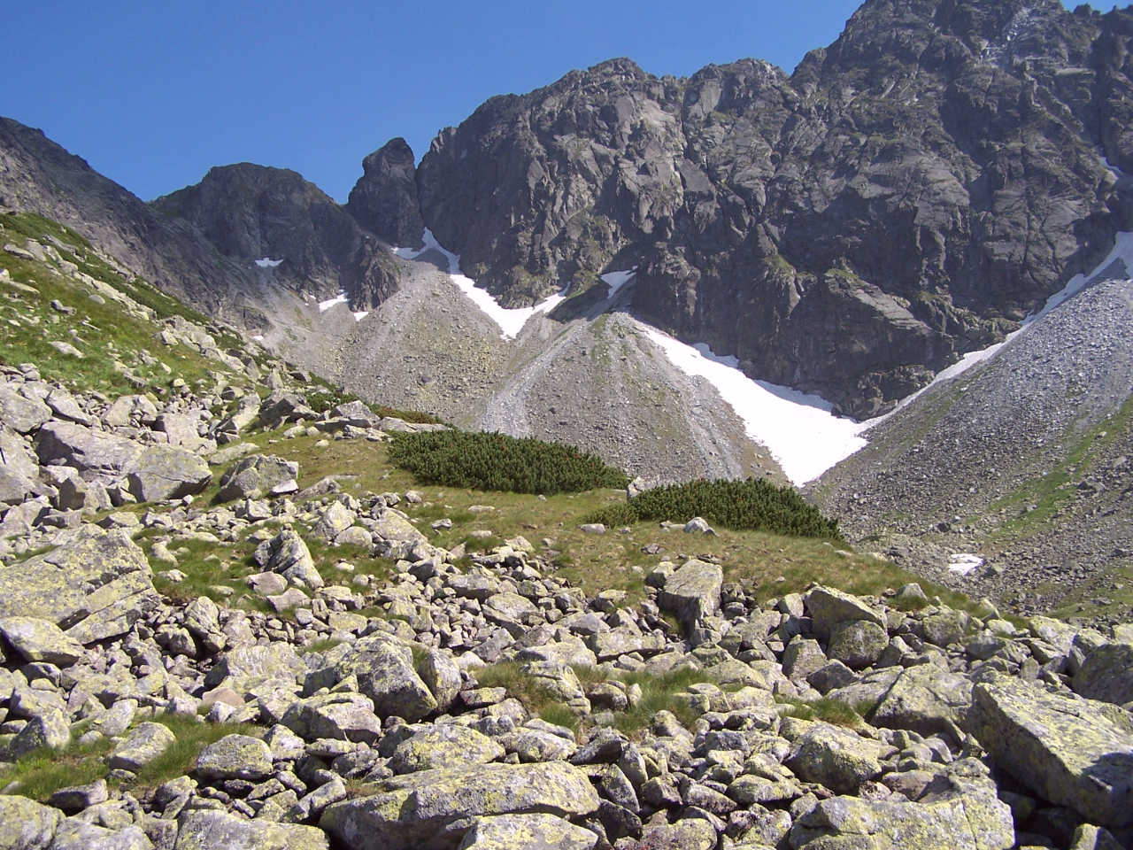 Zadnie Usypy - Dolina Pańszcyca (Tatry)